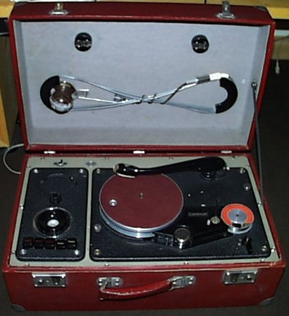 Koffer-Drahttongerät mit Plattenspieler, Deutschland um 1950